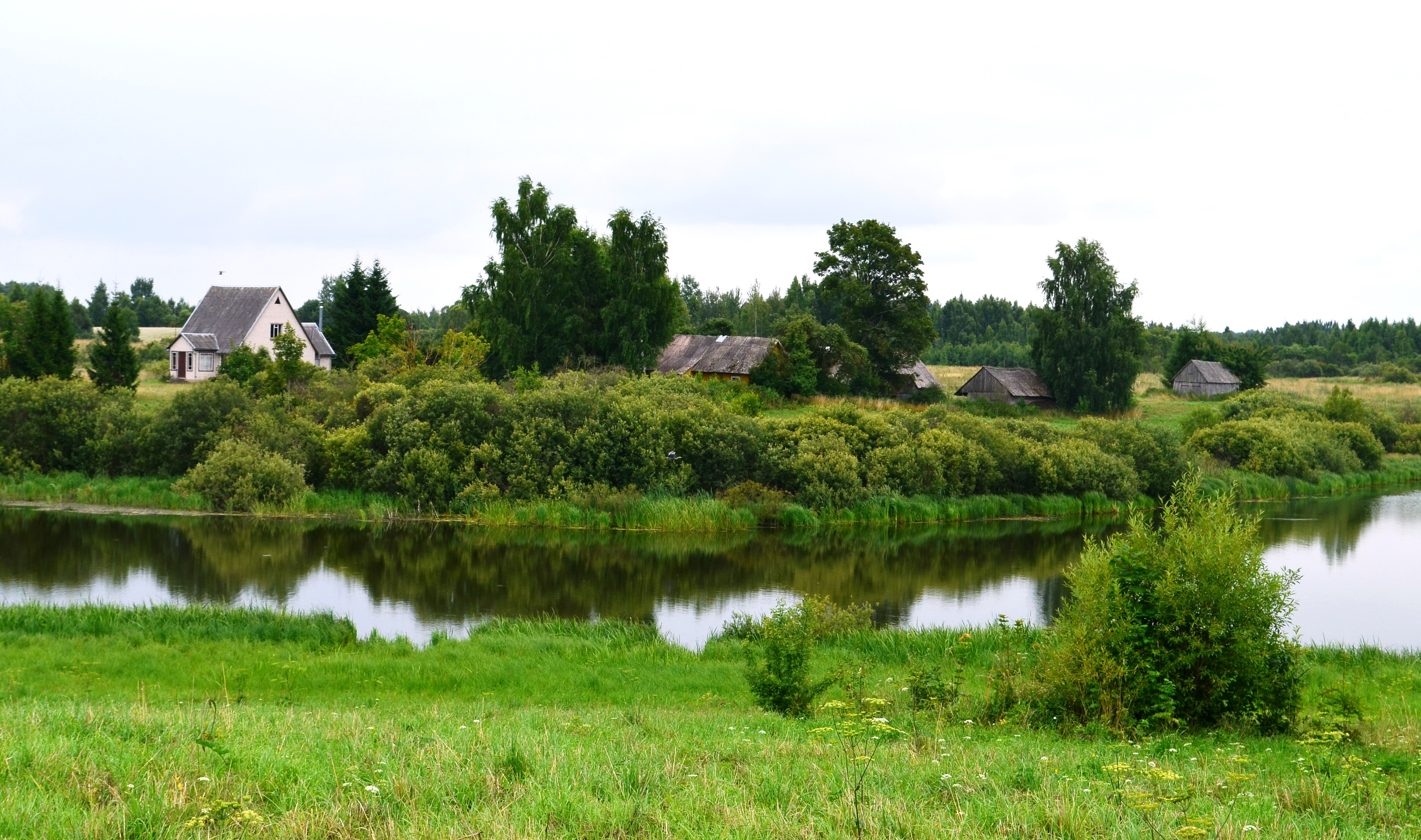 Čivyliai, Rokiškio r.